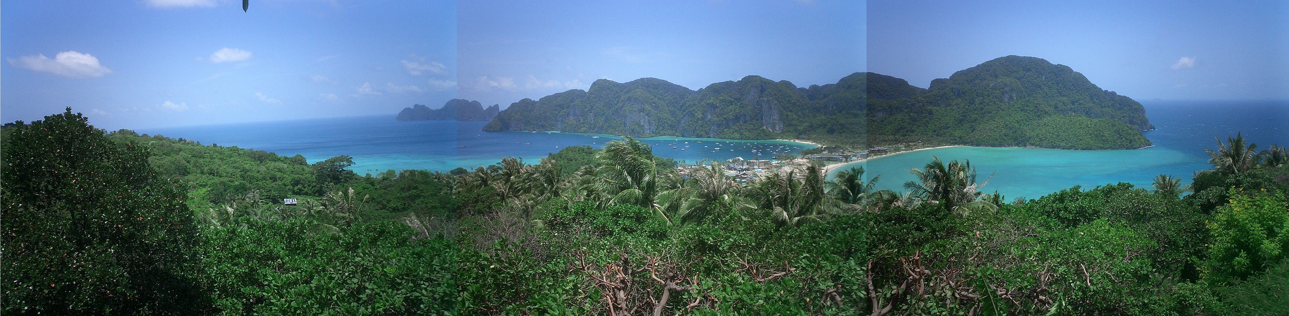 Ausblick vom "VIEW POINT" Bild von der Thailändischen Insel Koh PHI PHI DON gelegen an der Westküste Süd-thailands. Aufgenomen von A.Breitenstein im Spätsommer 2005